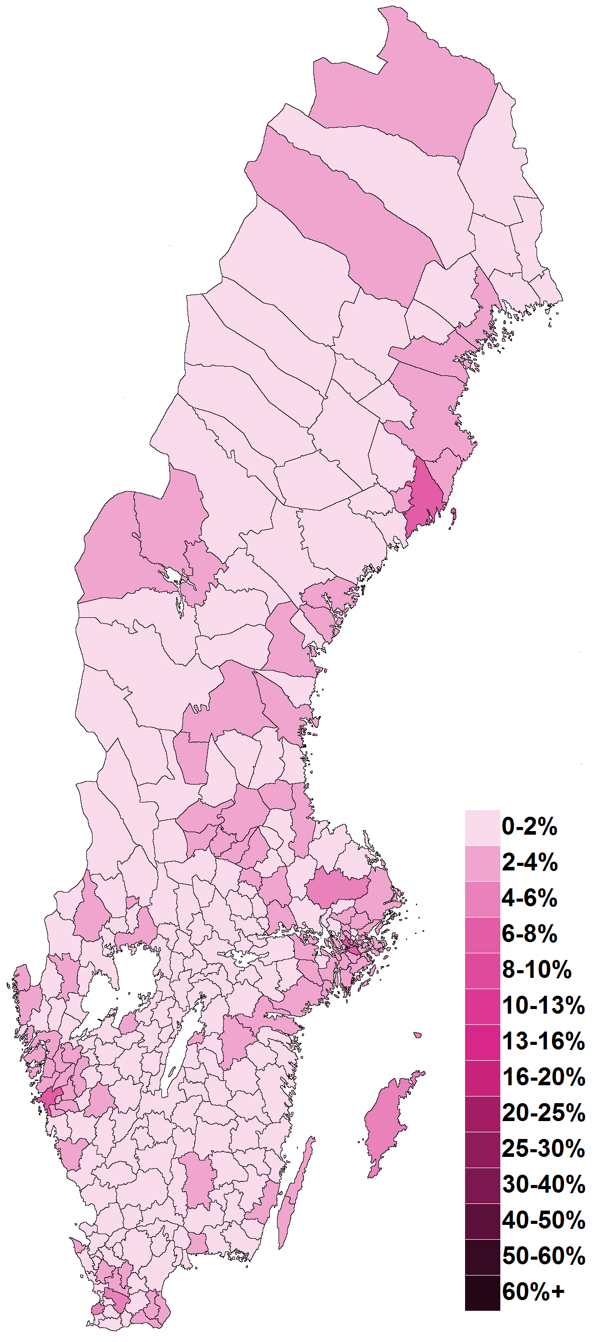 Karta som visar andelen av rösterna för Feministiskt Initiativ i riksdagsvalet 2014 varje kommun